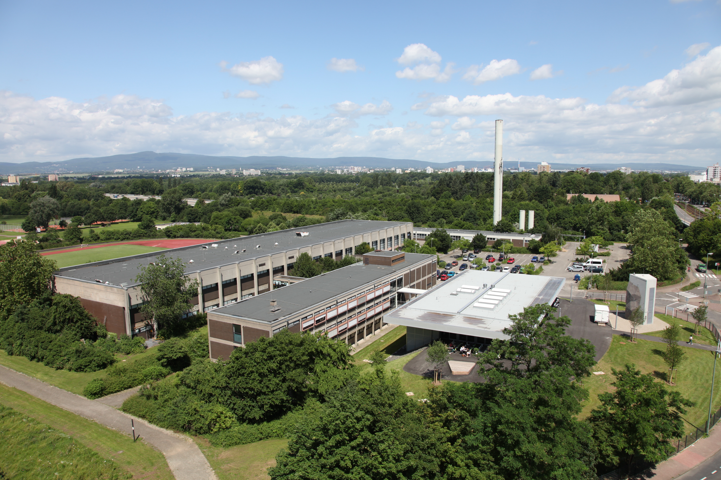 Sportgelände der Universität Frankfurt am Main